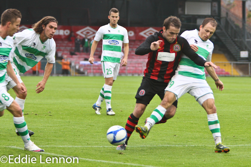 Bohemians V Olimpija Ljubljana (12 of 37)